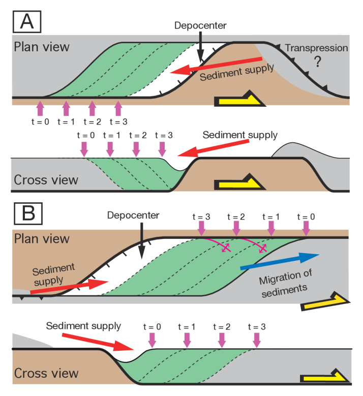 estentsio eremuetan sortutako faila mailakatuak dituen arroa